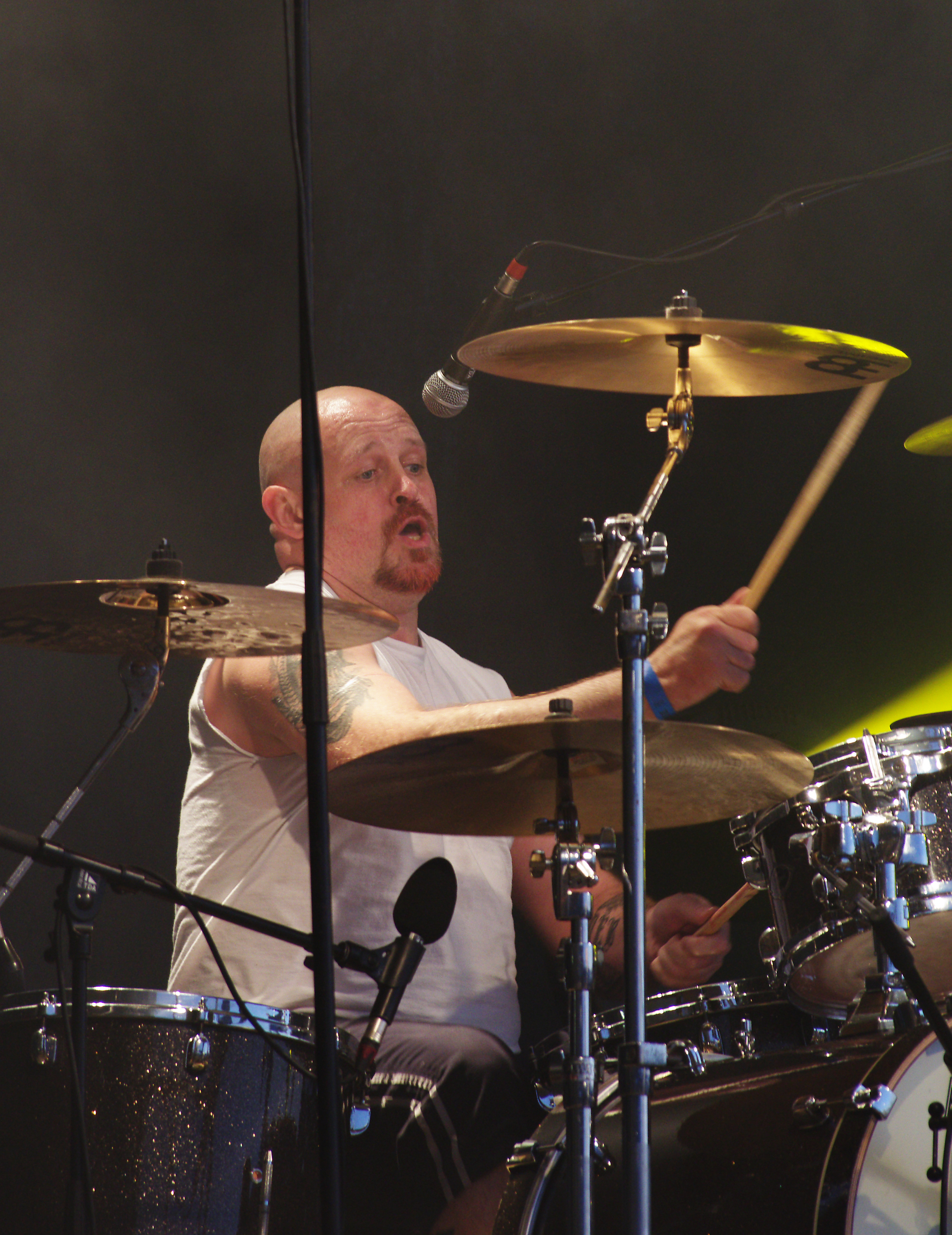 Cockney Rejects beim Ruhrpott Rodeo 2013 in Hünxe. Andrew Laing (Drums)